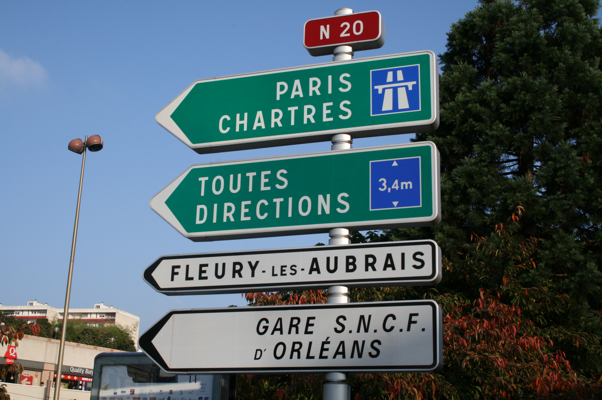 Panneau D21a avec des mentions vertes et des mentions blanches (France)